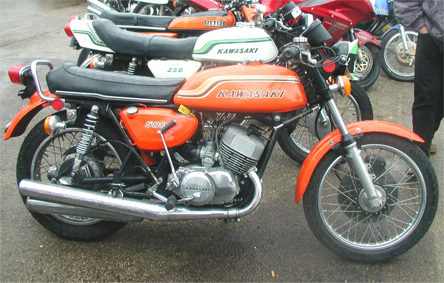 Kawasaki 500 H1B del 1972